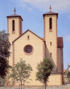 Ansicht der Kirche vom Obermarkt aus.